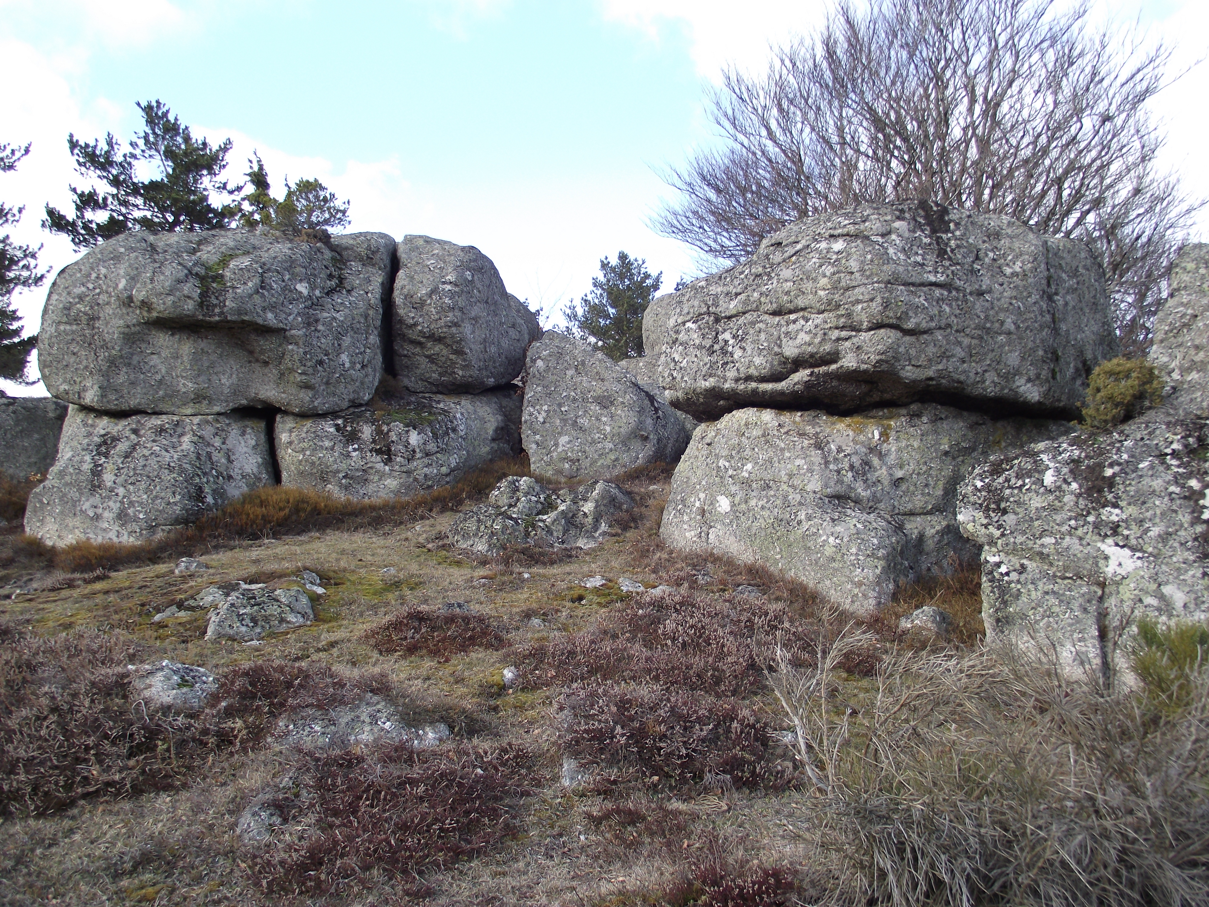 Chaos granitique au sommet du puy de la Souche (commune de St Laurent de Muret, Lozère, France, altitude : 1295 m)